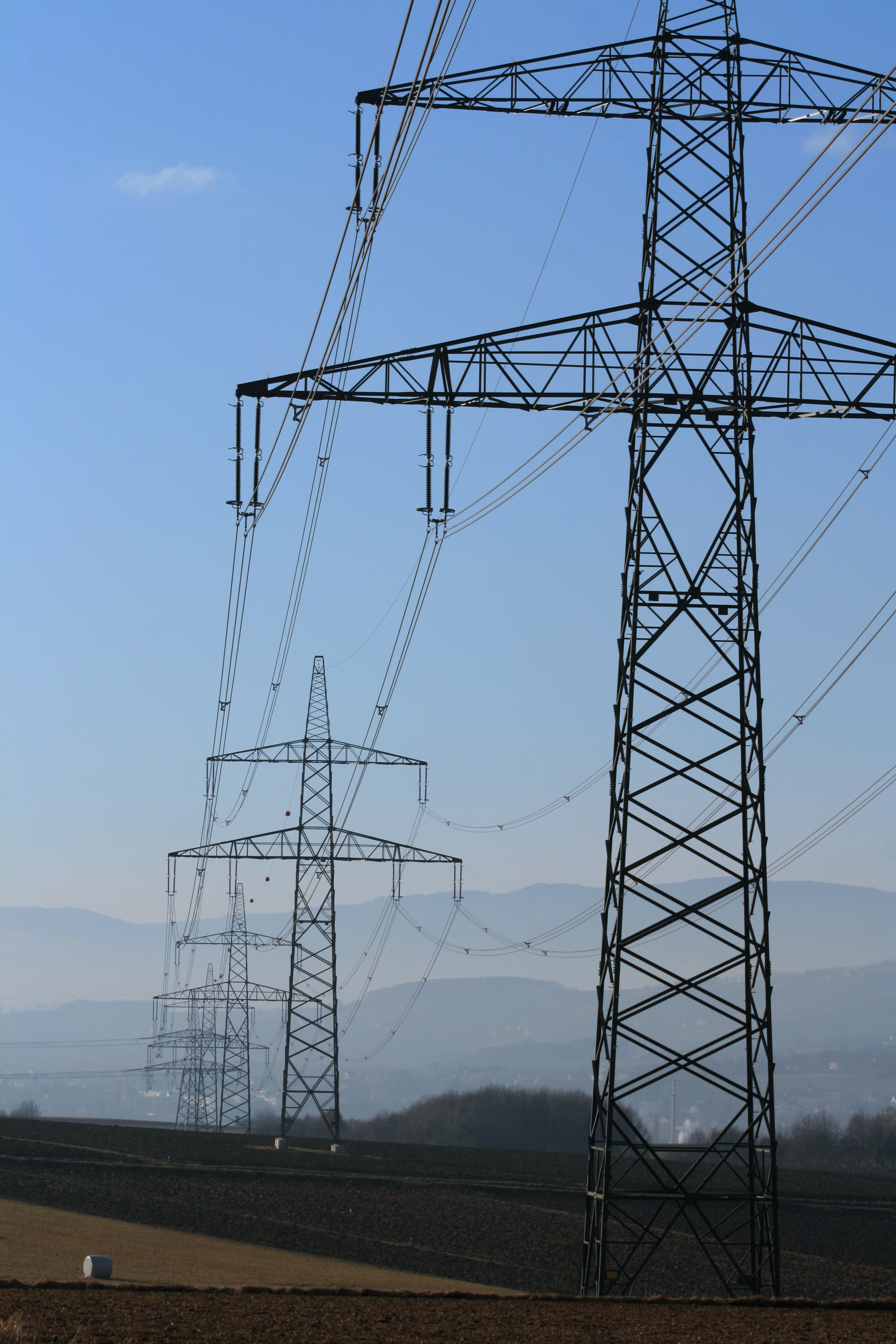 380-kV-Steiermarkleitung bei Hartberg, Sankt Johann in der Haide, Streckenverlauf in Richtung Westen